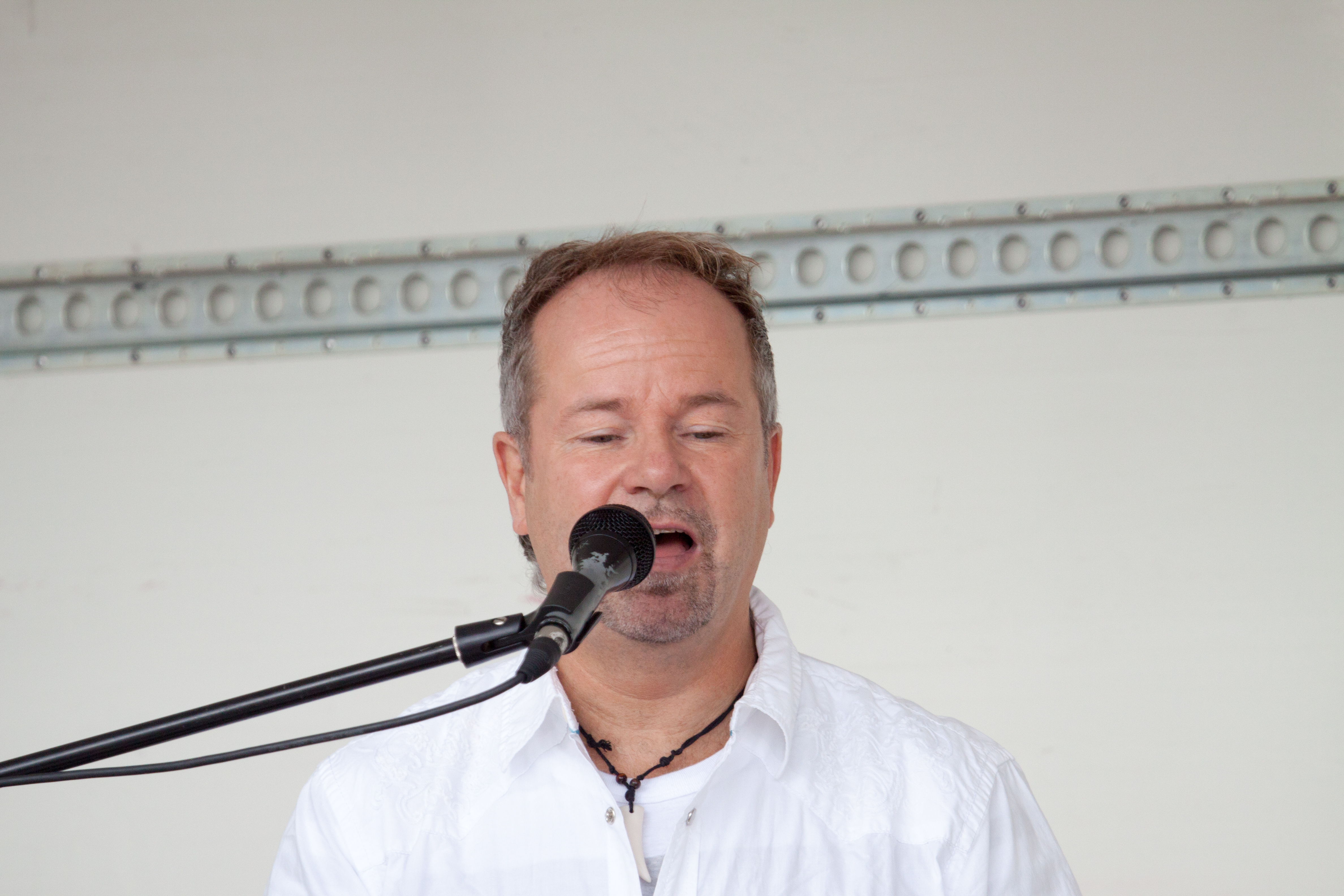 Petri Laaksonen